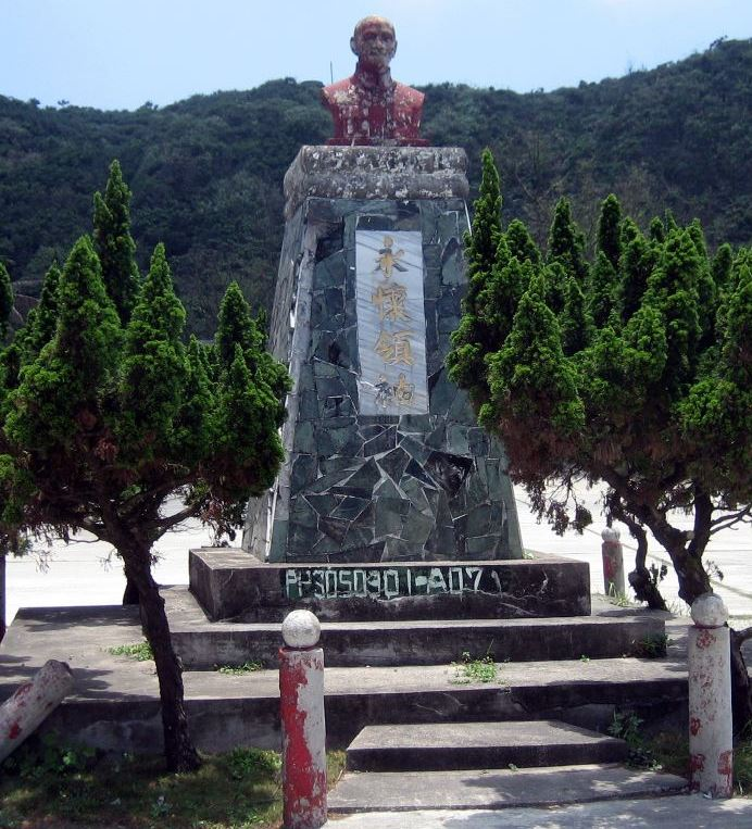 臺灣民主化後的"永懷領袖"